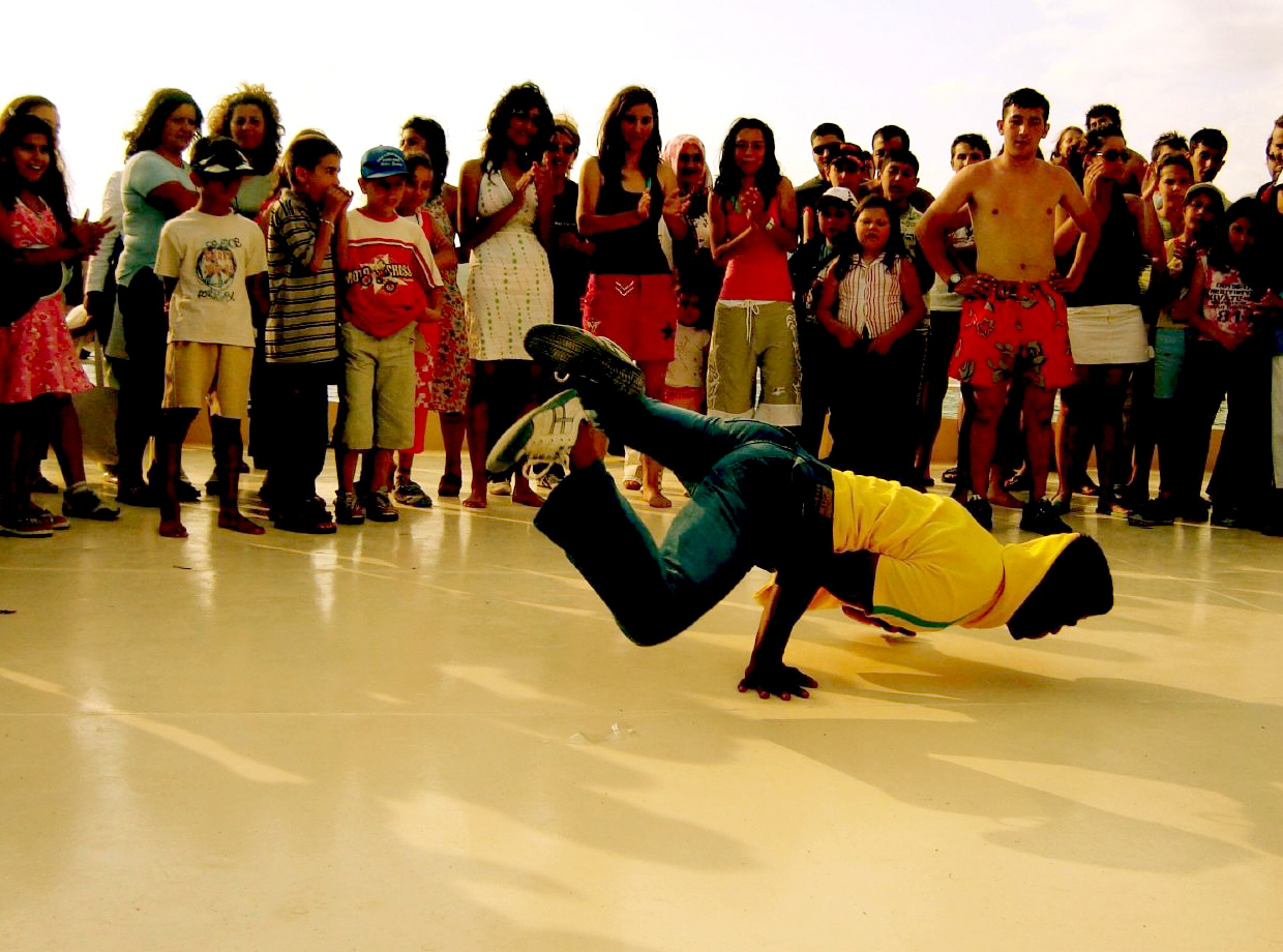 Breakdance